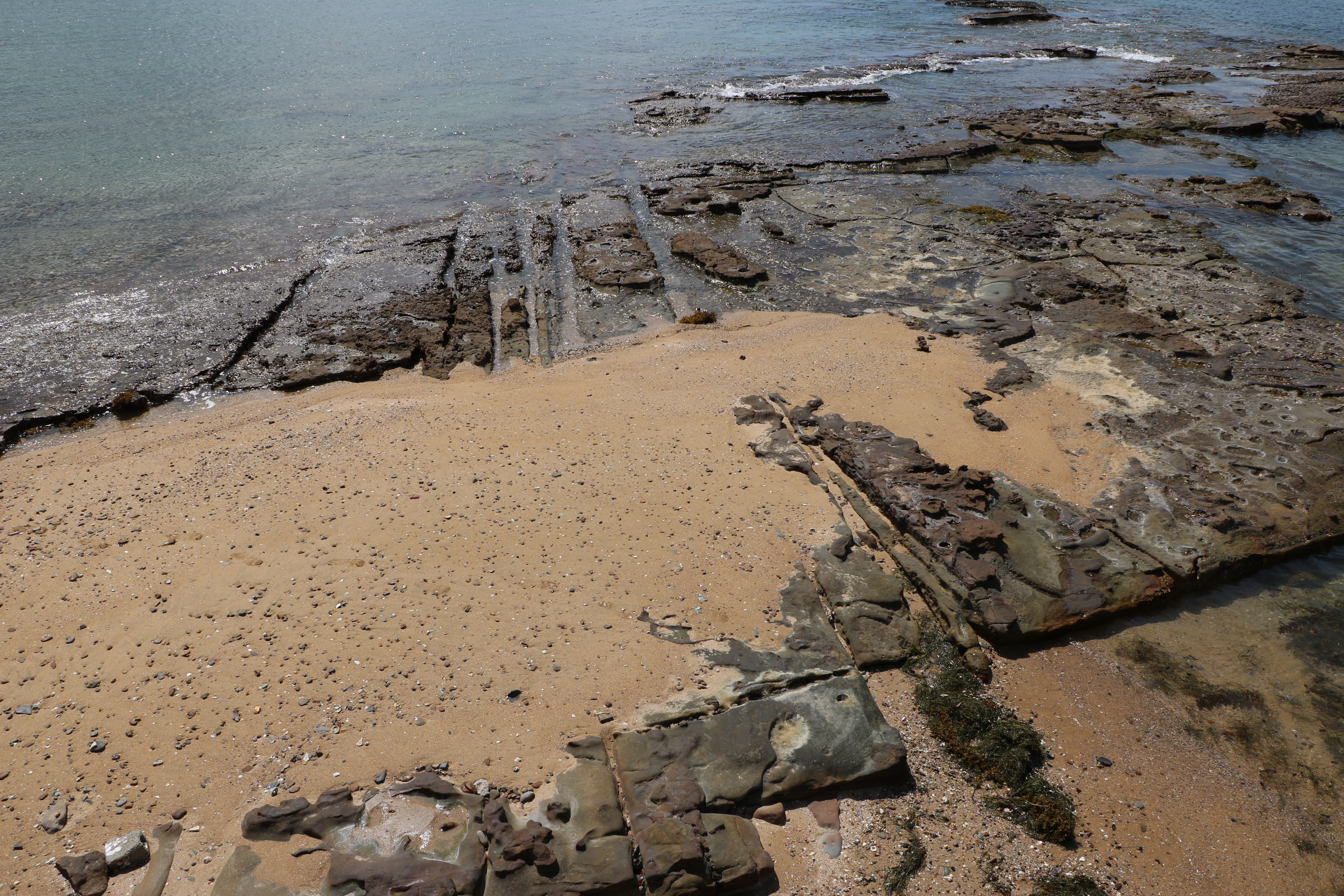 鳥巣半島の泥岩岩脈（国指定天然記念物、和歌山県田辺市）